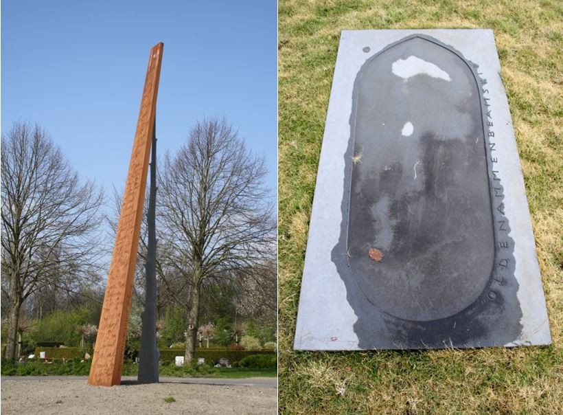 Gerrit Terpstra,2009